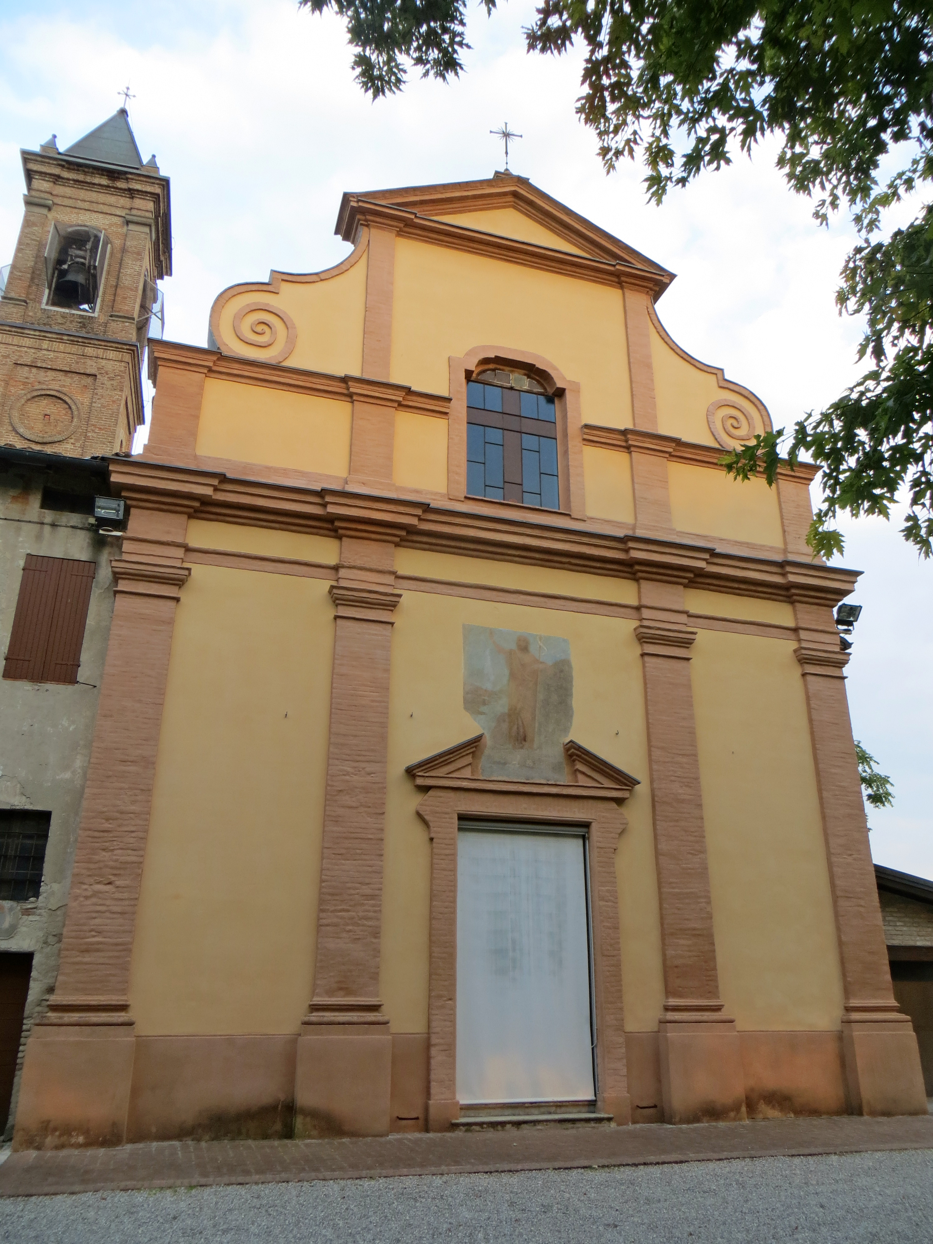 Chiesa dei Santi Giovanni Battista e Lorenzo (Bianconese, Fontevivo) - facciata